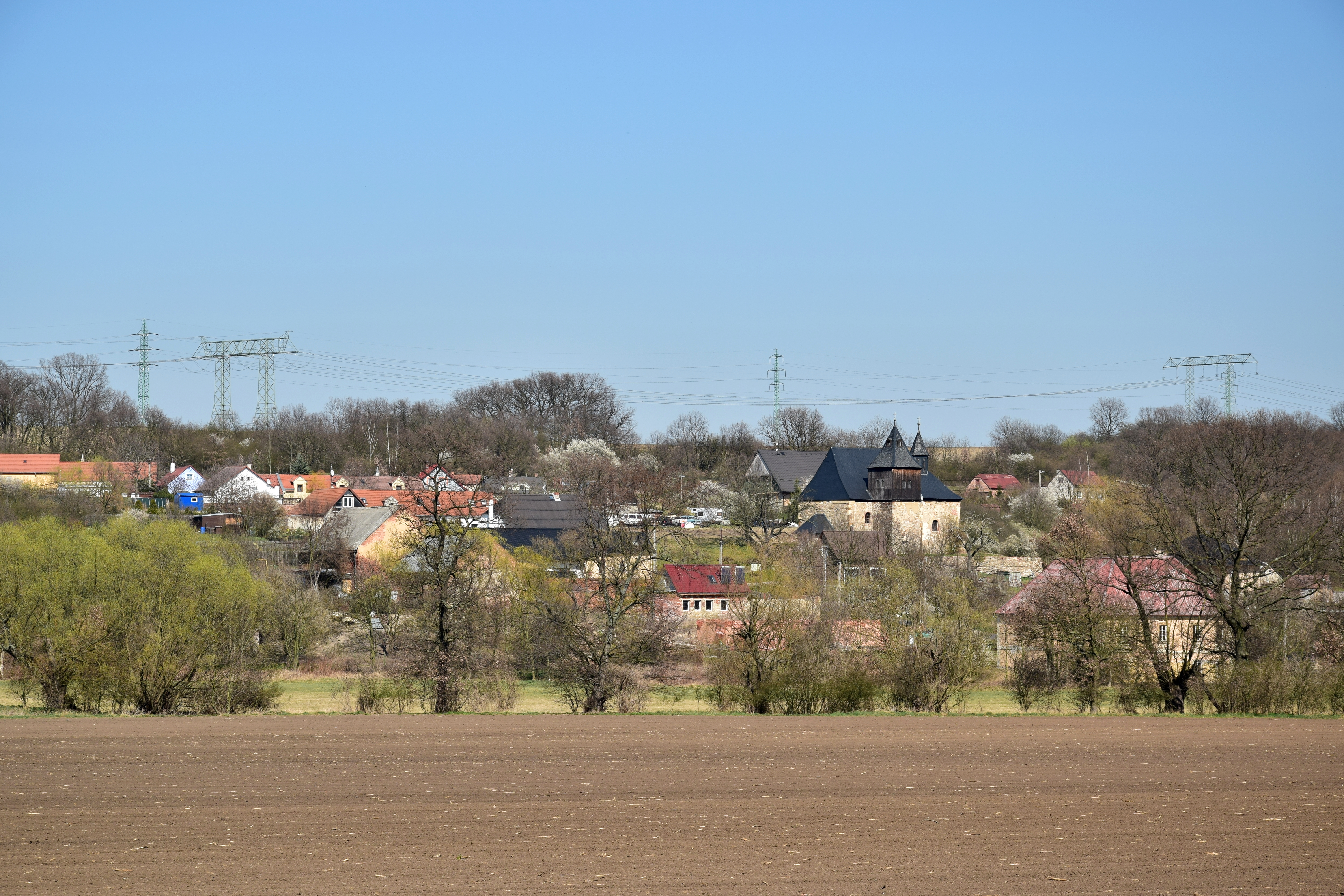 Škrle – celkový pohled na starší část vesnice od jihozápadu